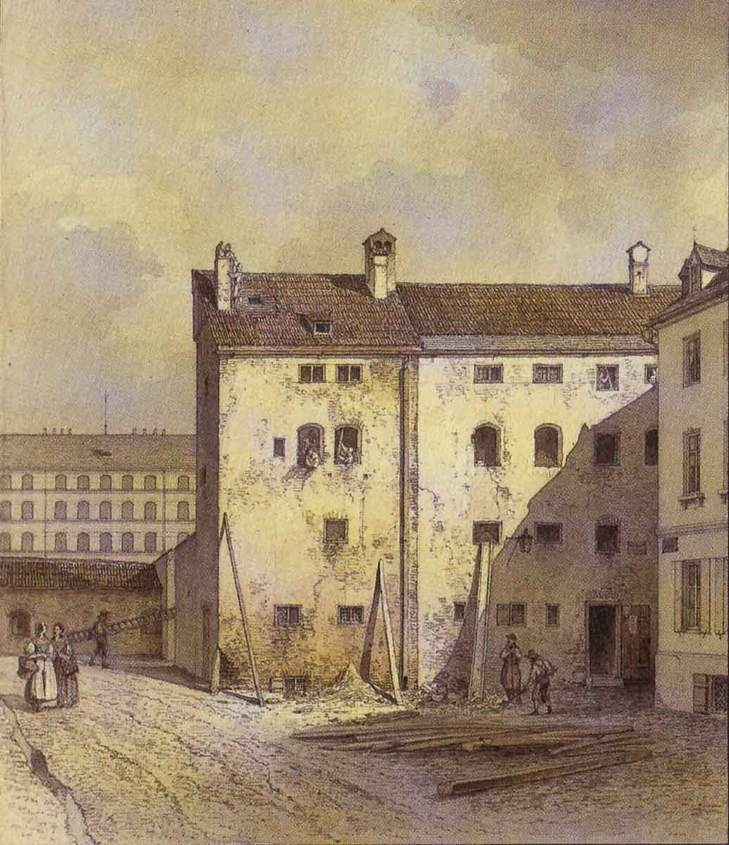 Ansicht des Stadtmauerthurmes u. Anbau von dem Sebastians Platz aus nächst dem blauen Bock genommen. Diesen Theil der alten Stadtmauer kam zum Abbruch am 26. April 1848 u. mit Beginn desselben m. d. Natur gez. von C. A. Lebschée.